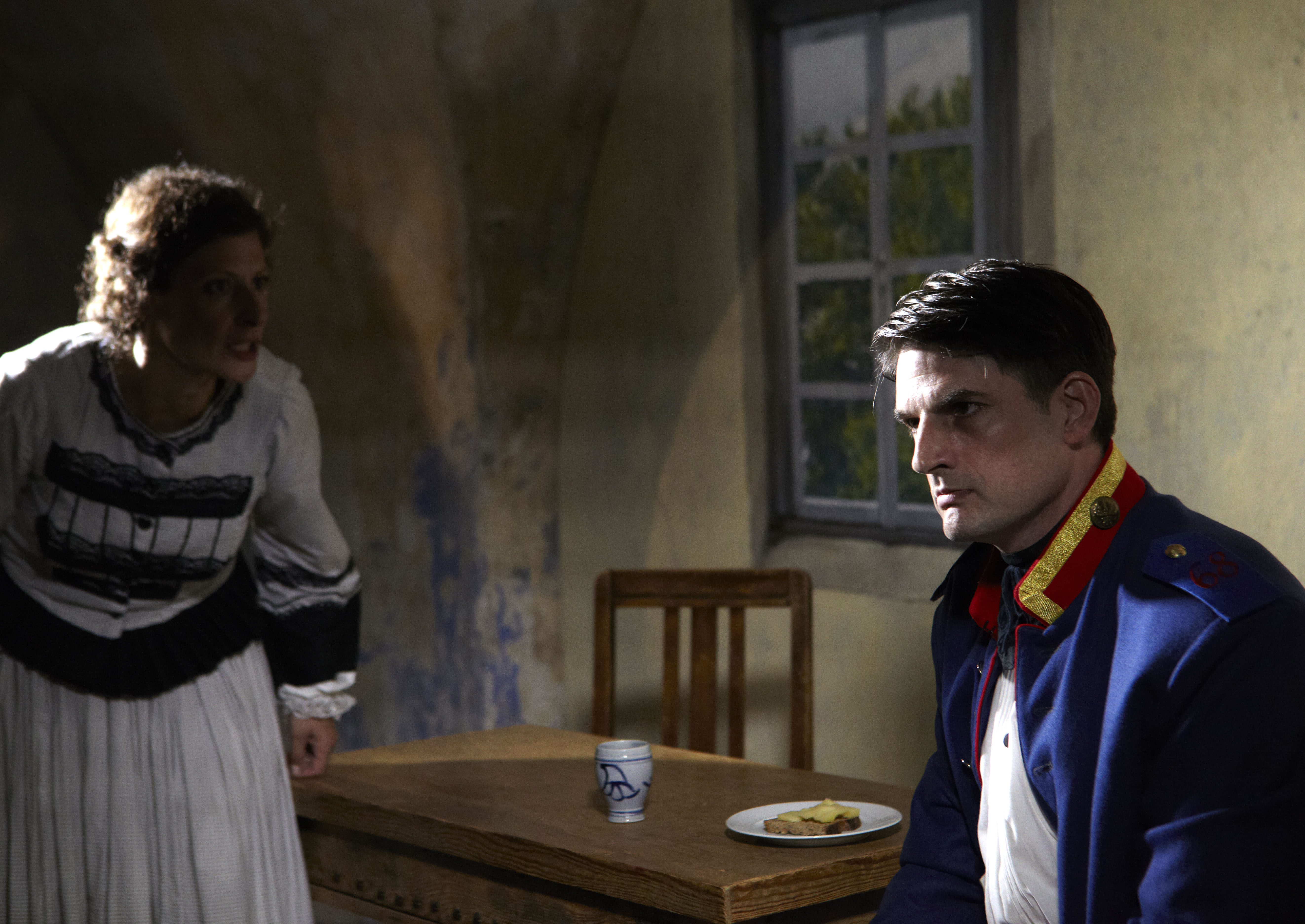 Blut und Königsbleiche. Theaterstück von Maria W. PeterEin Frauenschicksal auf der Festung EhrenbreitsteinDie Autorin Maria W. Peter ("Die Festung") hat ein Theaterstück über das Leben einer Soldatenwitwe auf der Festung Ehrenbreitstein im 19. Jahrhundert geschrieben.Compagnie en route präsentiert das Stück in der neuen Spielstätte im Ravelin auf der Festung Ehrenbreitstein in authentischer Umgebung und Atmosphäre am Ort des Geschehens.Regie: Carola MoritzMarthe: Myriam TancrediThomas: Christoph Gérard SteinMusik: Michael Policnik